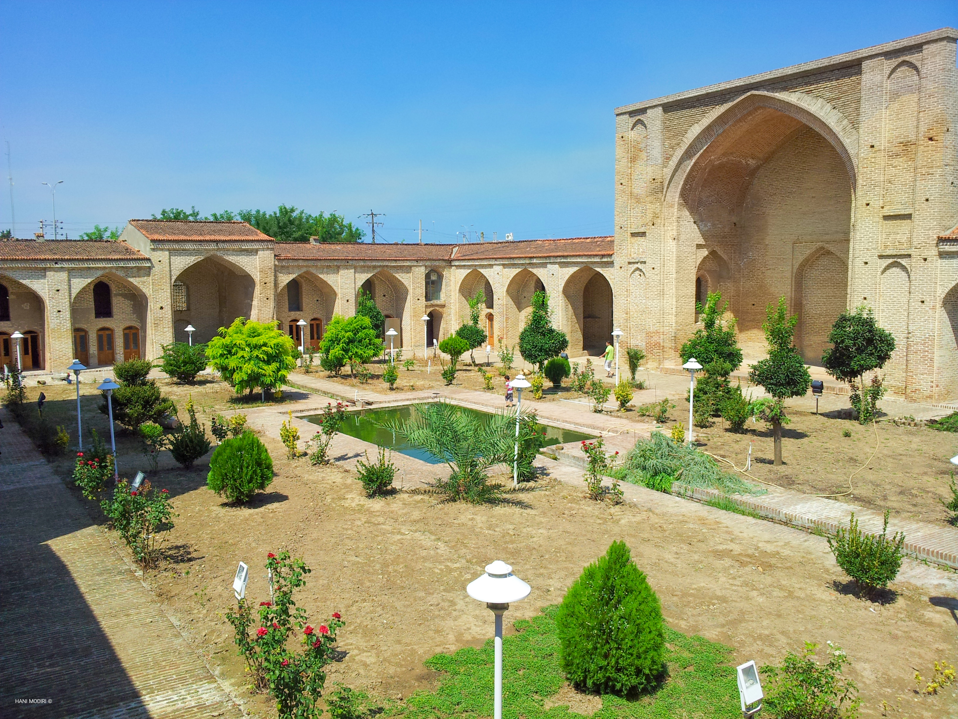 مجموعه فرح‌آباد